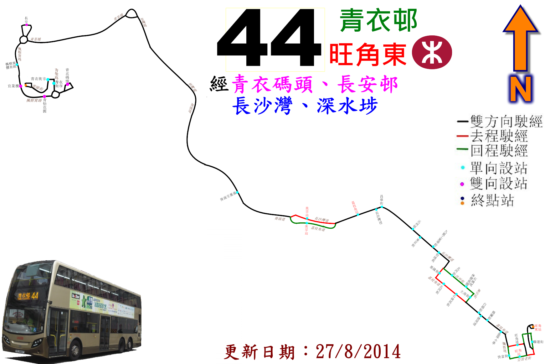 中文（香港）: 九巴44線的走線圖